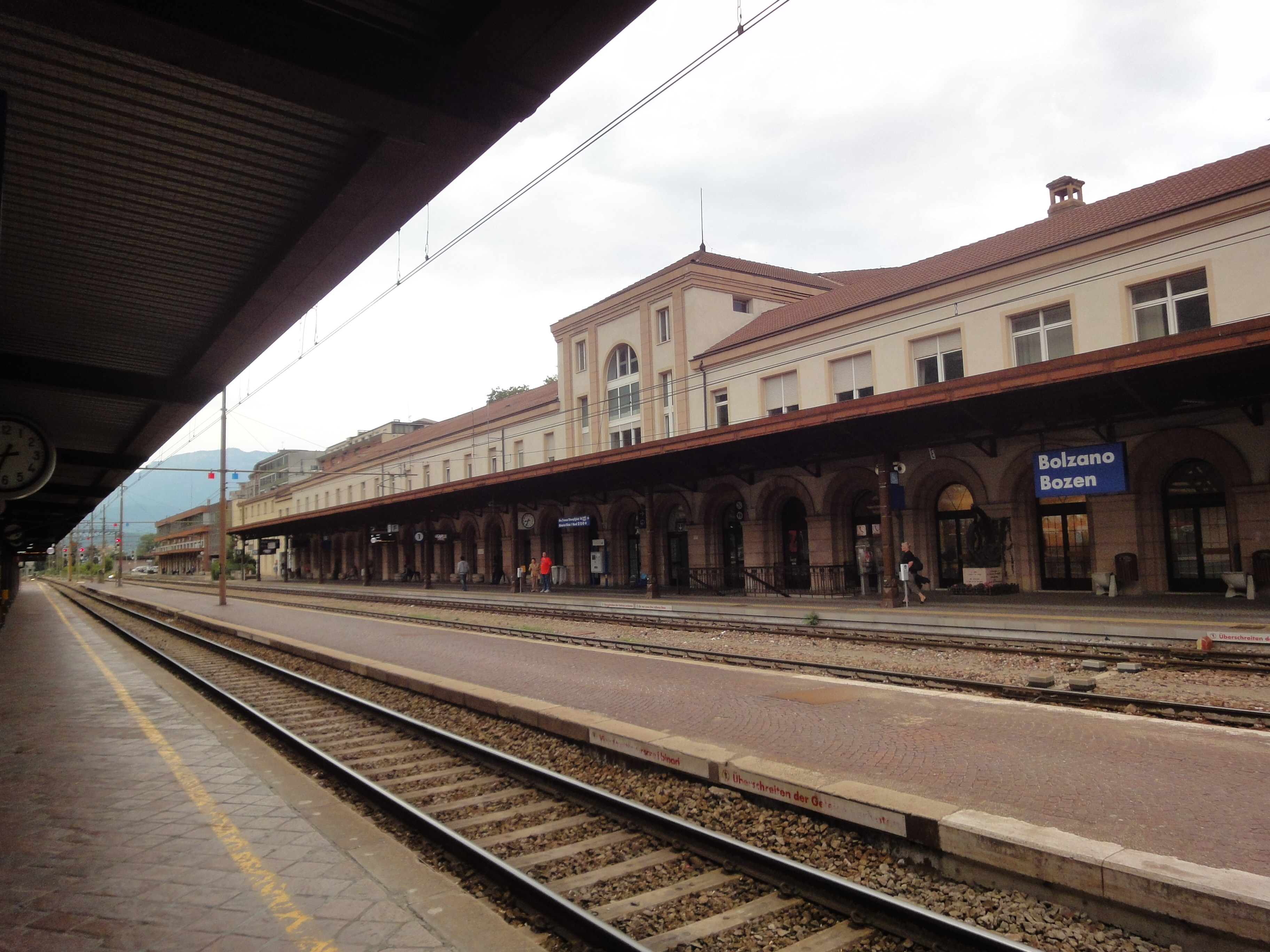 Bahnhof Bozen